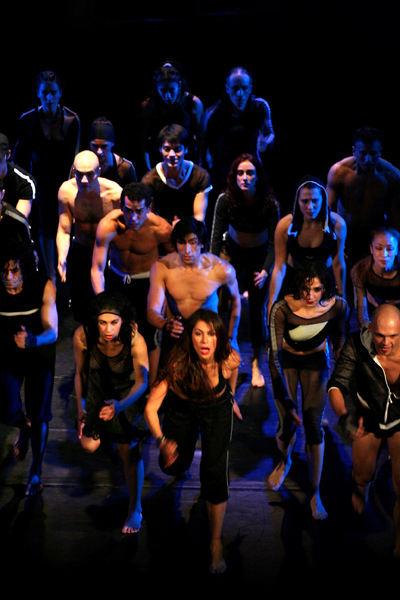 ¨El banch prerarando su nuevo estreno: “Comedia”